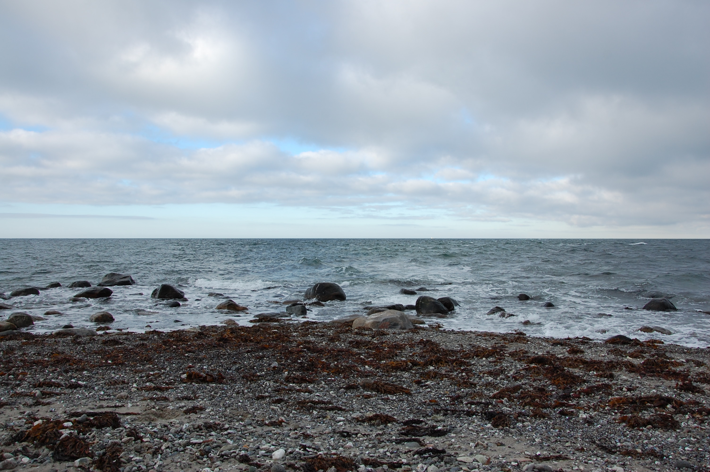 Gnibben Blick vom Gnibben auf das Meer